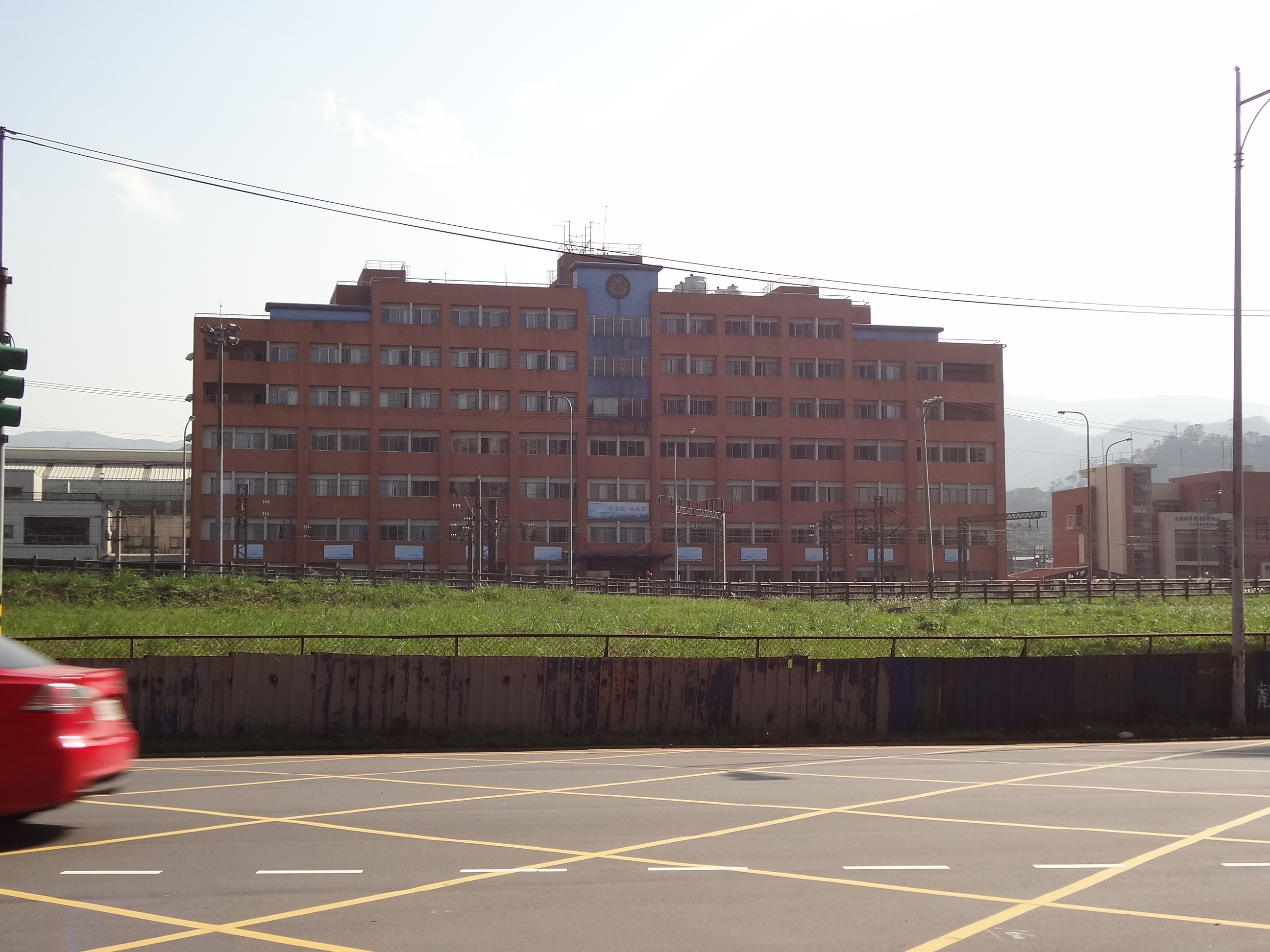 從基隆市七堵區明德一路拍攝臺灣鐵路管理局七堵機務段大樓。